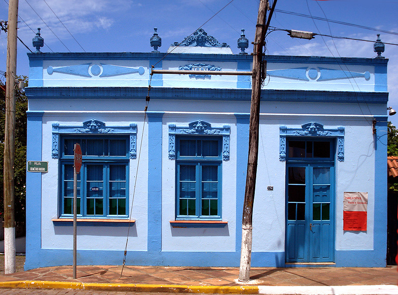 Casario histórico de Triunfo, Rio Grande do Sul.